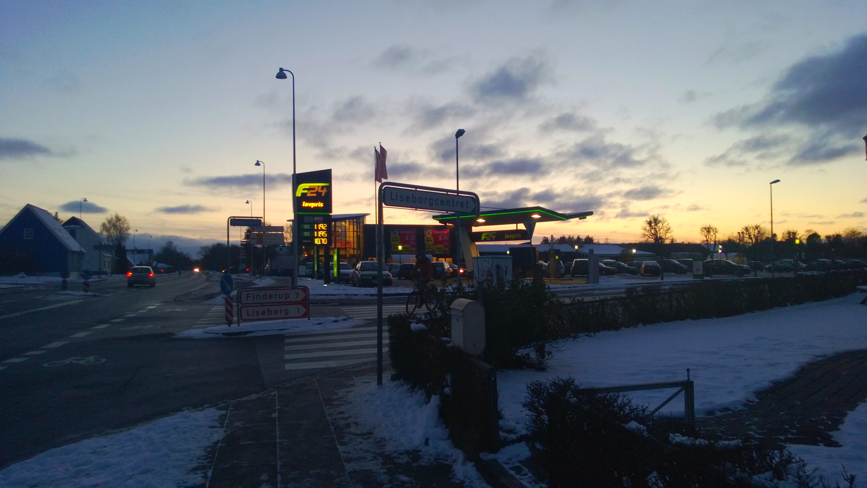 Billede taget i Liseborg en sen eftermiddag i Januar